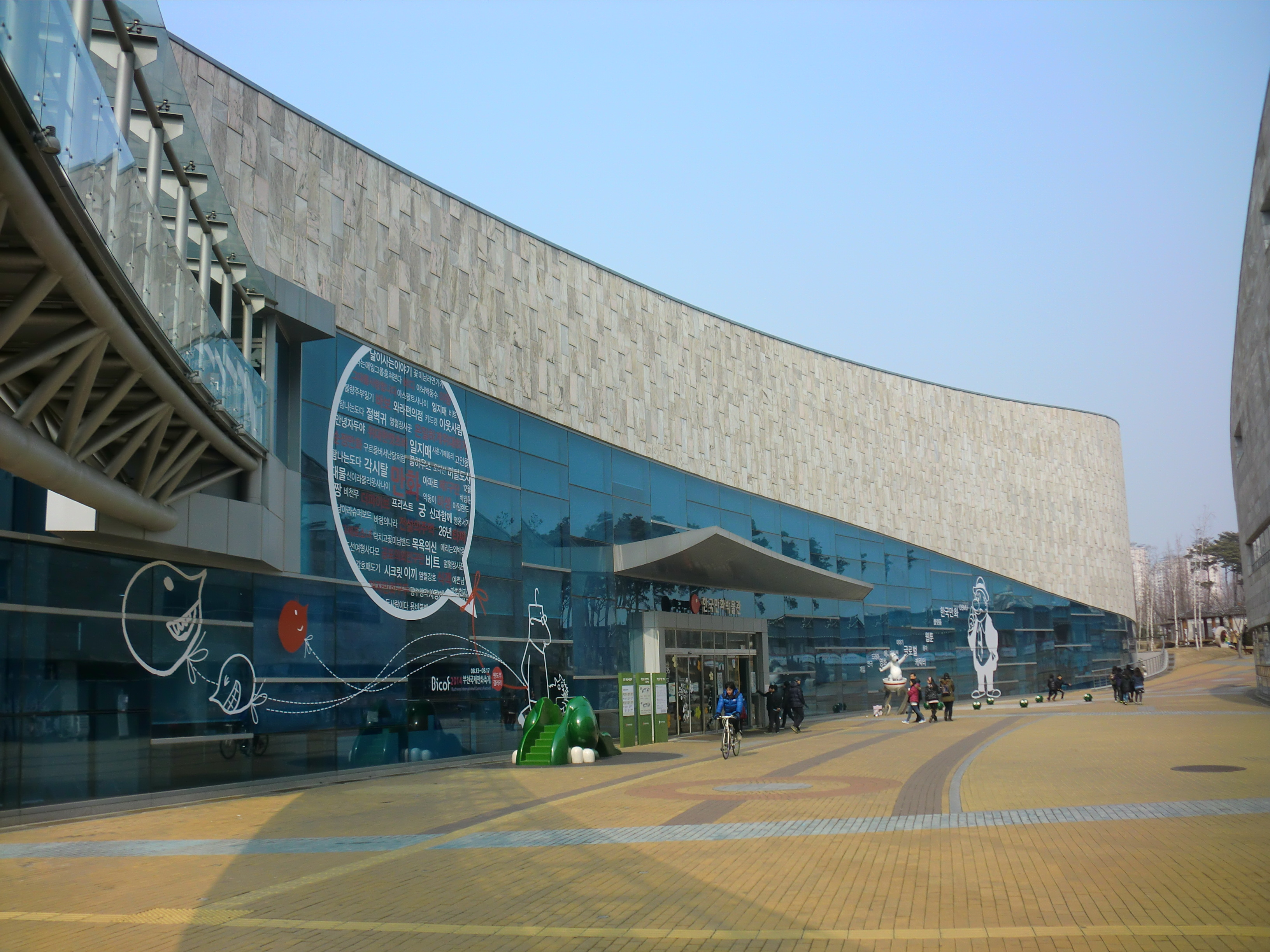 경기도 부천시에 있는 한국만화박물관